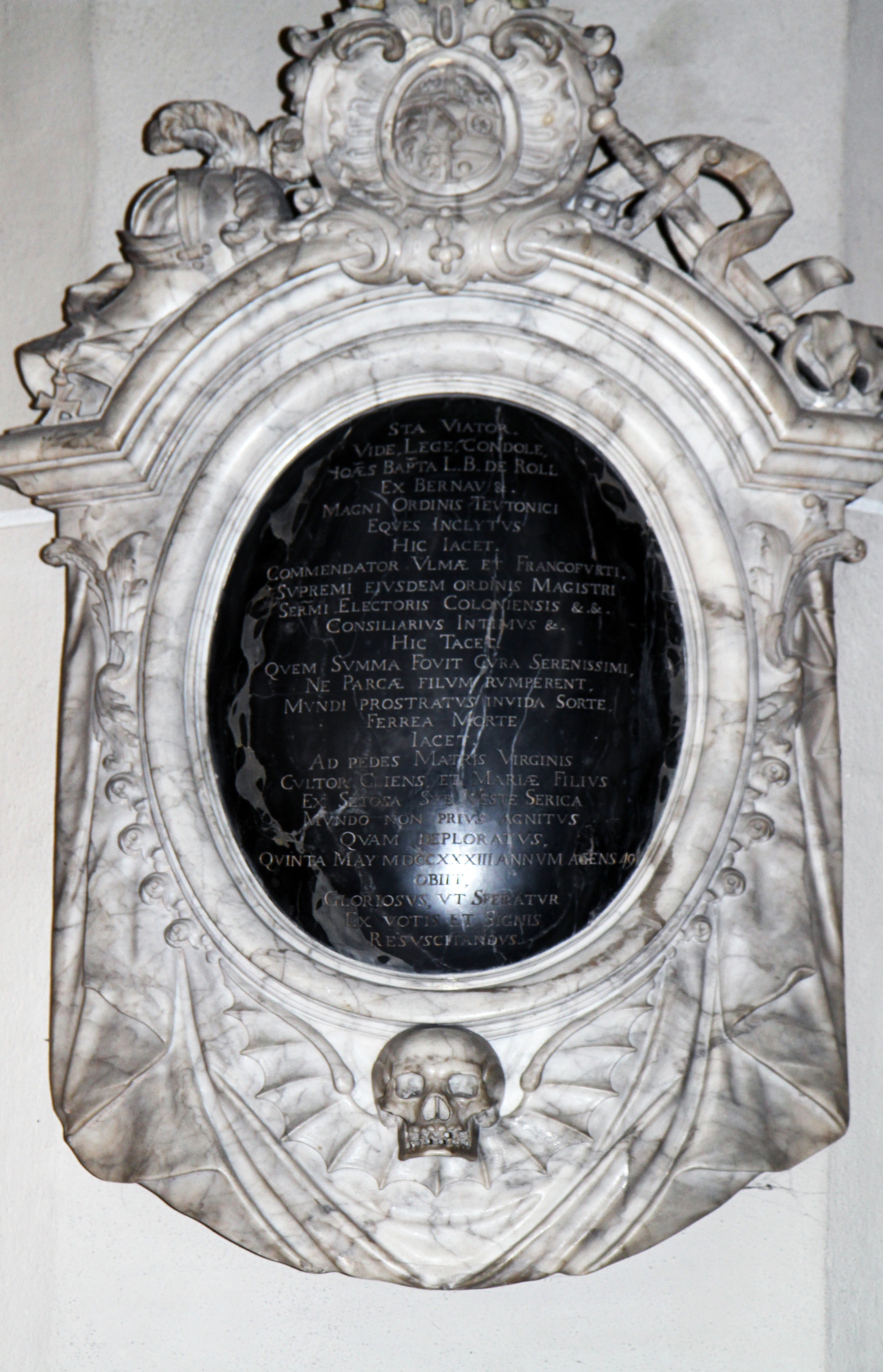 Epitaph für den Freiherrn Johann Baptist von Roll. Das Ausstattungsstück der Pfarrkirche St. Margareta in Brühl ist an der Wand des nördlichen Seitenschiffes angebracht. Die Gedenktafel, 107 zu 70 cm, wurde 1733 von dem Kurfürsten Clemens August gestiftet und besteht aus weißem und schwarzem, jeweils grau geädertem Marmor. Die Tafel wird eingefasst von Helm, Spotrn, Schwert und Deutschoedenskreuz, sowie einem unter der Inachrift prangenden Totenschädel mit den Schwingen einer Fledermaus. Literatur: Wolfgang Drösser: Die Pfarrkirche St. Margareta in Brühl. Festschrift zum 725-jährigen Bestehen der Pfarrei St. Margareta. Kath. Pfarrgemeinde St. Margareta, Brühl 1999. S. 104